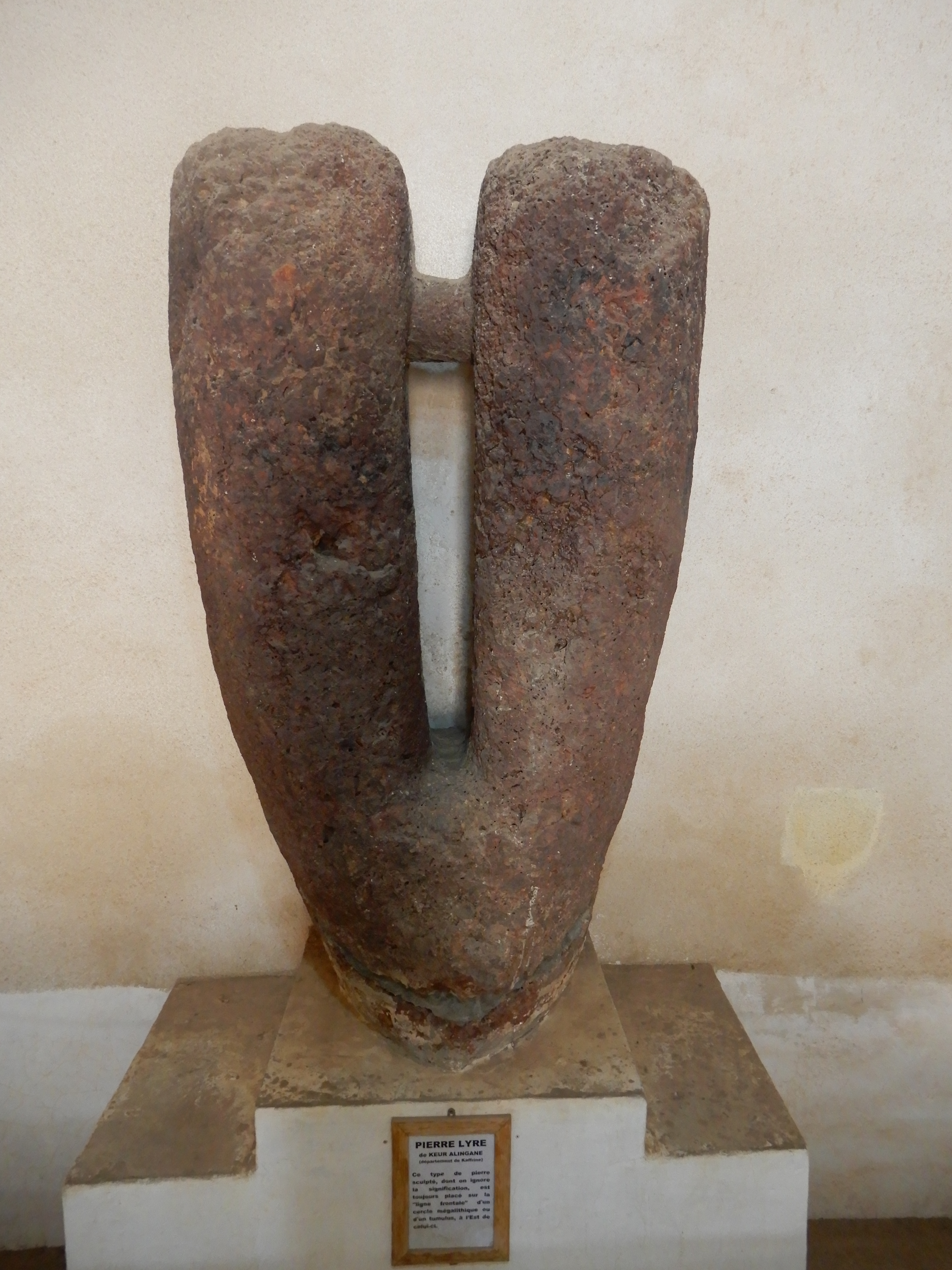 La pierre-lyre est un type de monument placé en ligne frontale des cercles mégalithiques. On en ignore la signification.